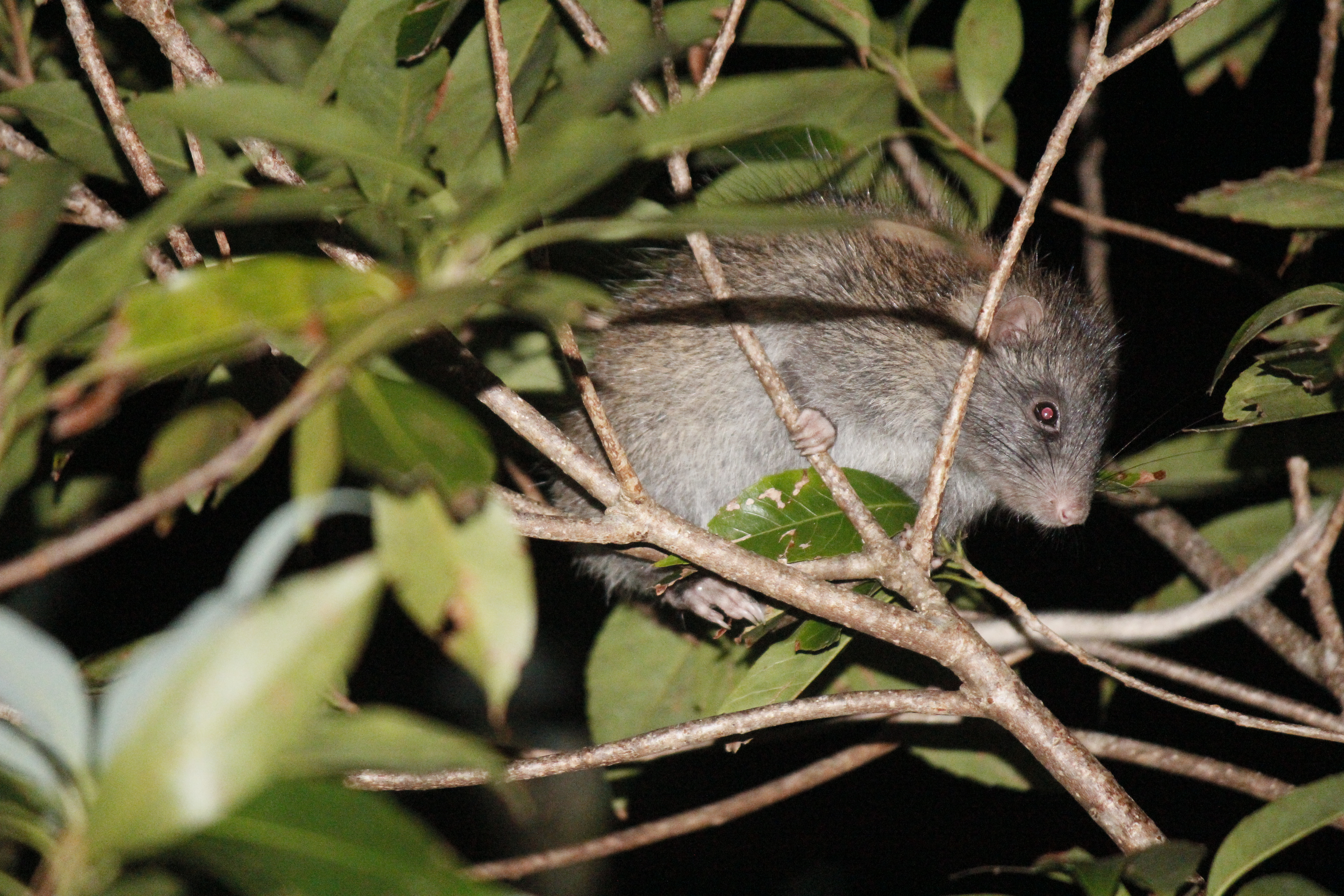 ケナガネズミの成獣